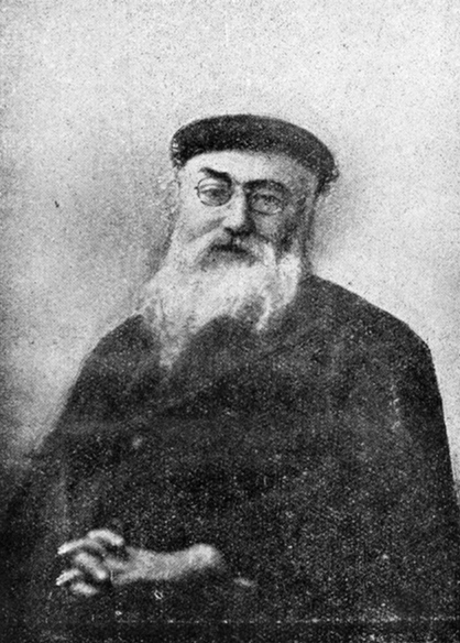 Francis Jammes (1868-1938) est un poète français, également romancier, dramaturge et critique.